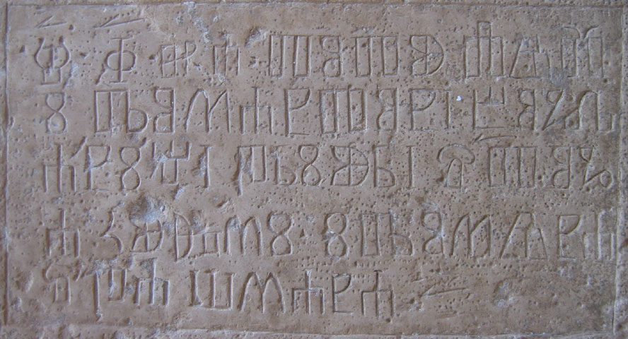 Glagoliza Ort: Kroatien commons: :commons:Image:Glagolica.jpg